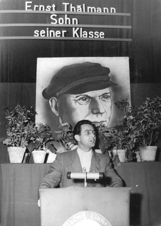 Zentralbild Funck 16.3.1954 Filmfesttage auf dem Lande Frühjahr 1954 haben begonnen. Im Oderbruchkreis Seelow (Bez. Frankfurt-Oder) begannen mit der Festaufführung des DEFA-Farbfilms "Ernst Thälmann - Sohn seiner Klasse" im MTS Kulturhaus Sachsendorf die Filmfesttage auf dem Lande - Frühjahr 1954. Den Genossenschafts- und werktätigen Einzelbauern, den Landarbeitern und Arbeitern der Betriebe stellten sich in dieser Vorstellung eine Gruppe der Darsteller des Dokumentar-Films vor. UBz.: Das Bild Ernst Thälmanns schmückt, umgeben von Blumenschmuck, die Saalwand des MTS Kulturhauses. Am Rednerpult der Vertreter der Kreisleitung der Sozialistischen Einheitspartei Deutschlands, Kreis Seelow.